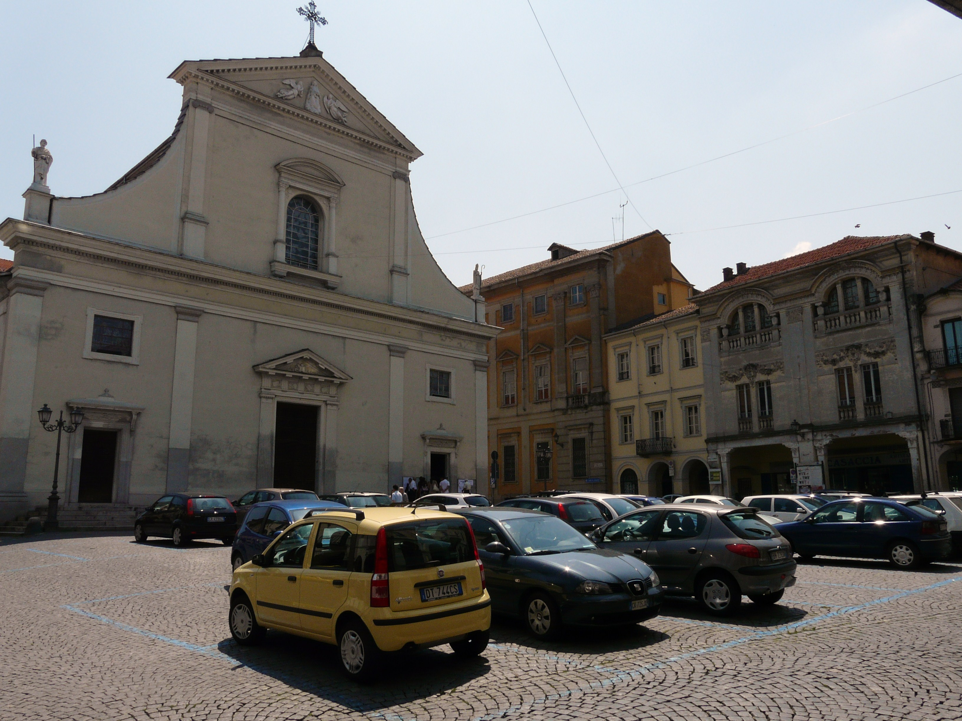 Piazza antistante il duomo di Valenza, Piemonte, Italia